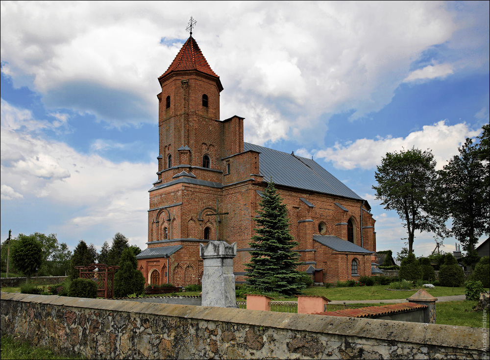 Гнезна. Касцёл